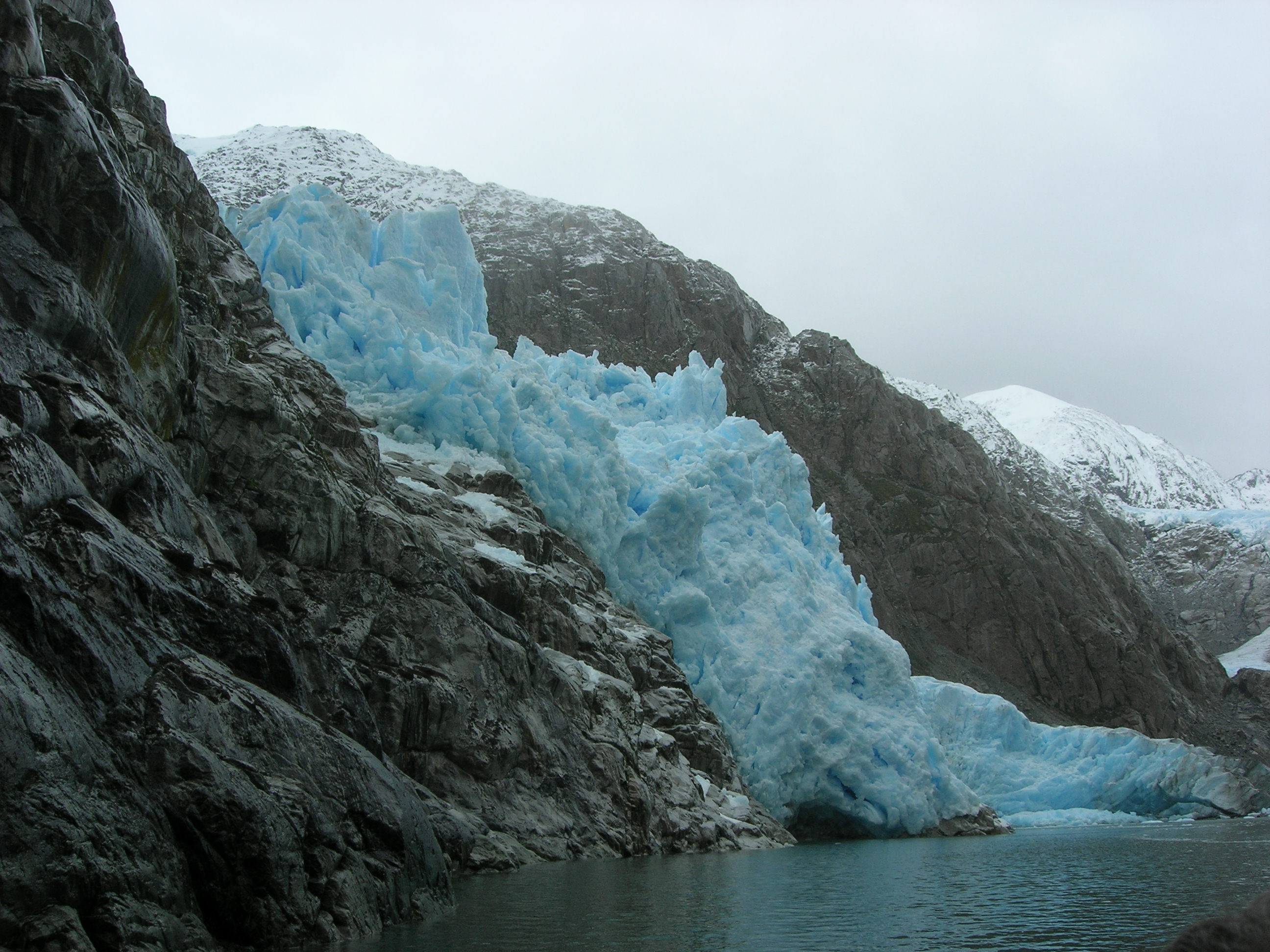 Glacier Piloto Chili